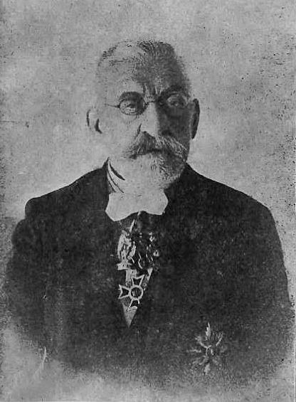 Antoni Kochanowski (-1904)